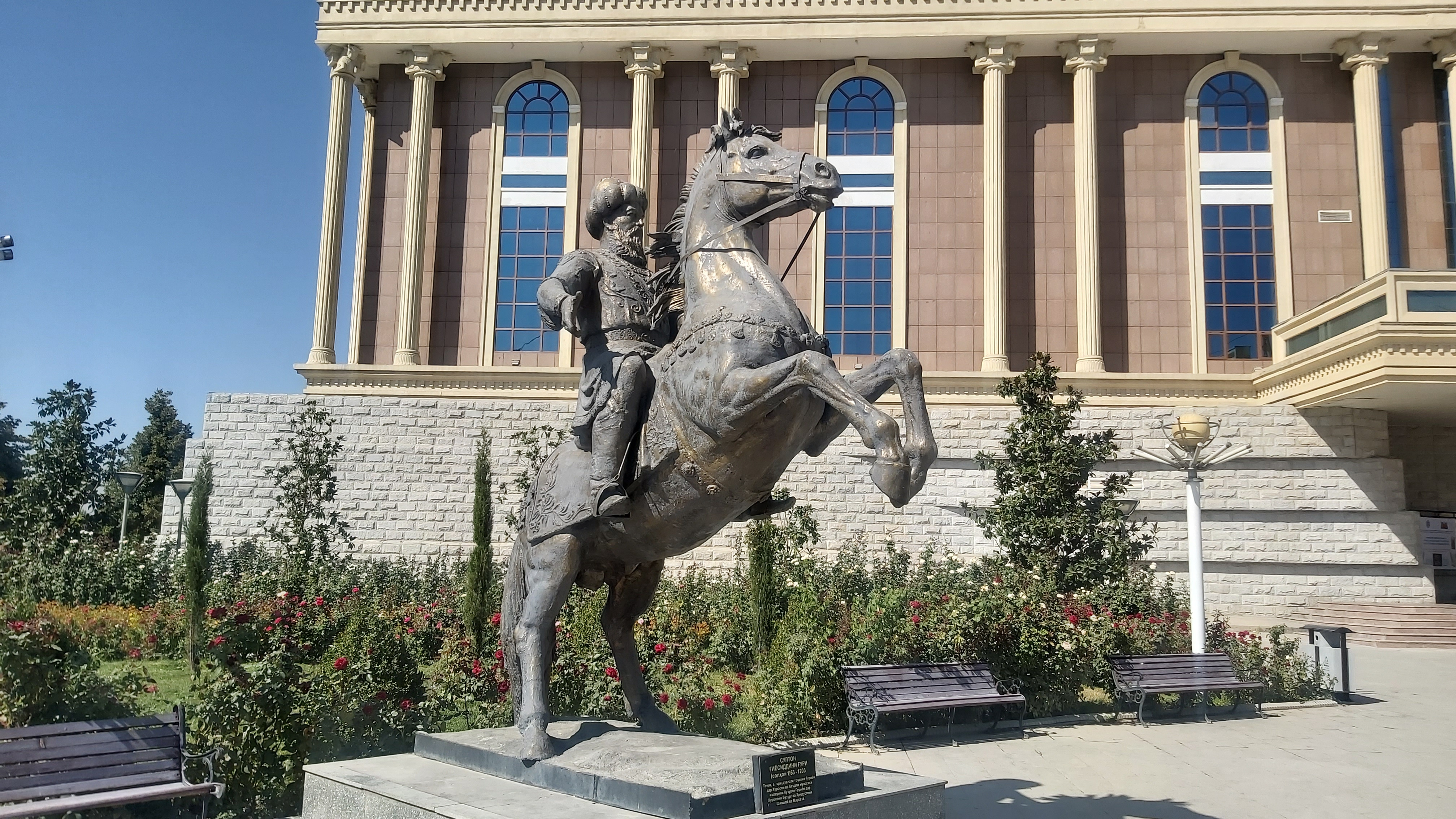 Гиясуддин Мухаммад